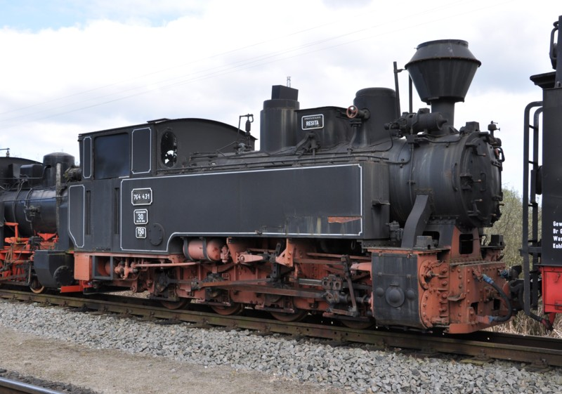 Ehemalige Waldbahnlokomotive 764-431 der Caile Ferate Forestiere (CFF) in Putbus, Rügensche Bäderbahn